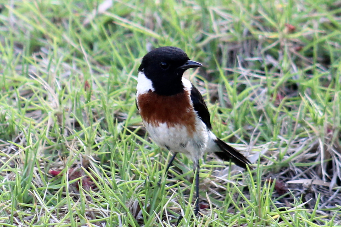 Vogel in Antananarivo